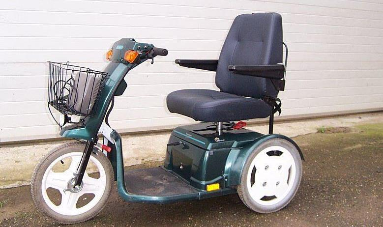 elektromobil electric scooter